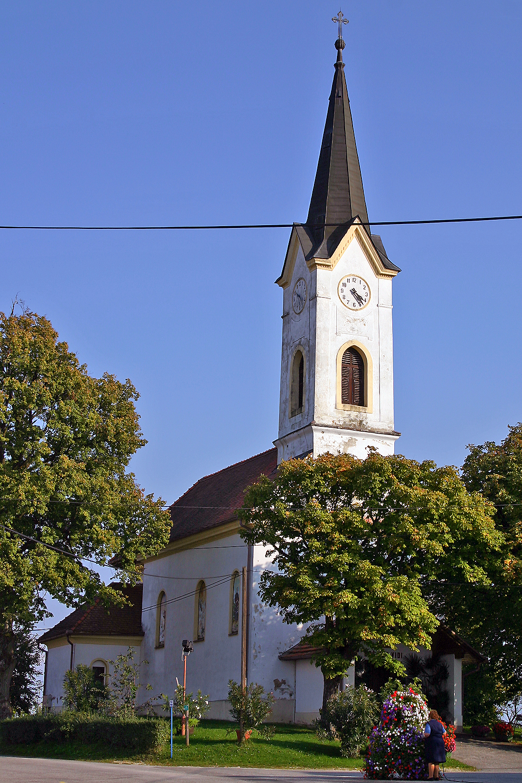 Cerkev svetega Boštjana, Pečarovci. Saint Sebastian church, Pečarovci. Die Kirche von heiliger Sebastian, Pečarovci.